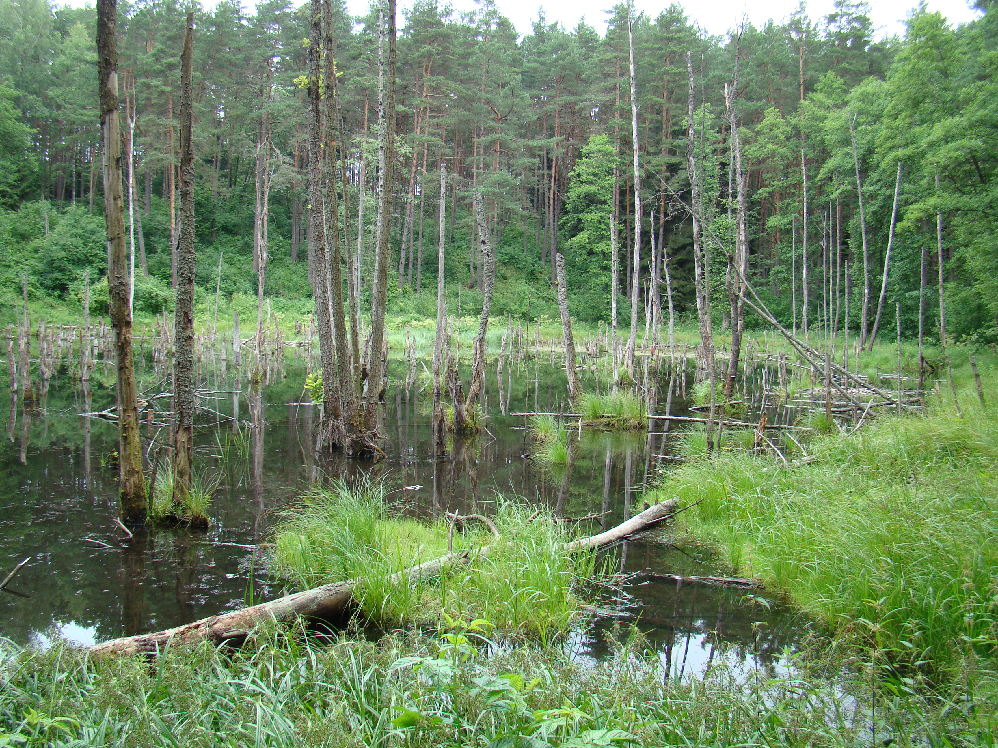 Šaltinis "Akis" netoli Šilėnų kaimo, Vilniaus rajone.Turistinis maršrutas Šilėnai-Naujosios Rėvos piliakalnis